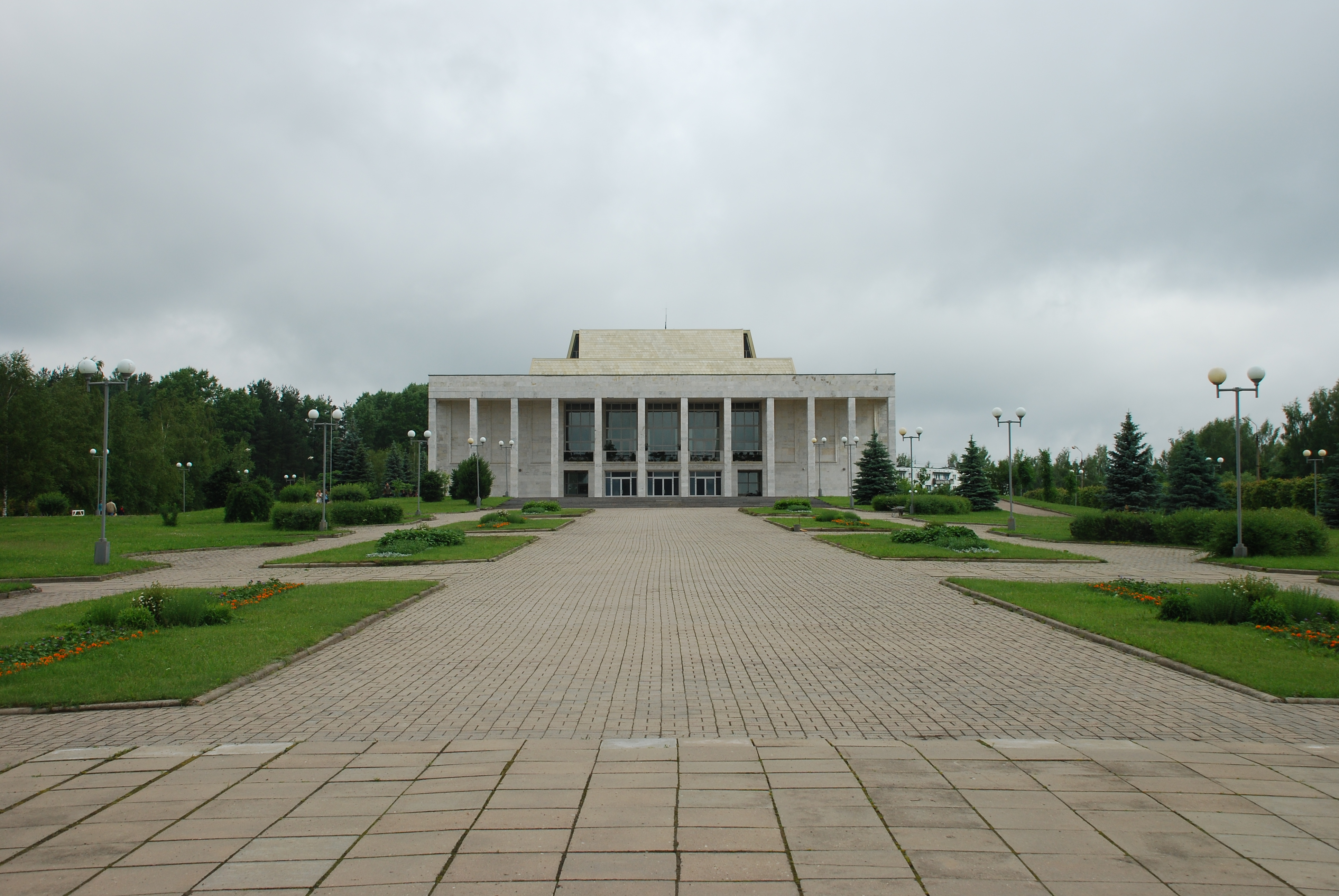 Научно-культурный центр (отдел музея-заповедника): улица Новоржевская, 24, Пушкинские Горы, Пушкиногорский район, Псковская область